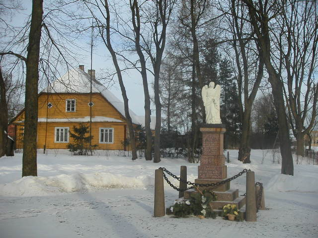 Tipiškas Rozalimo miestelio medinis pastatas Neprikalusomybės paminklo fone.